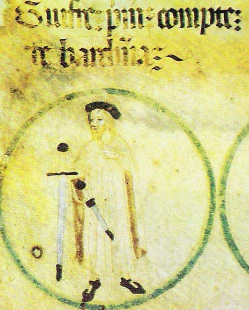 Rotlle genealògic del Monestir de Poblet